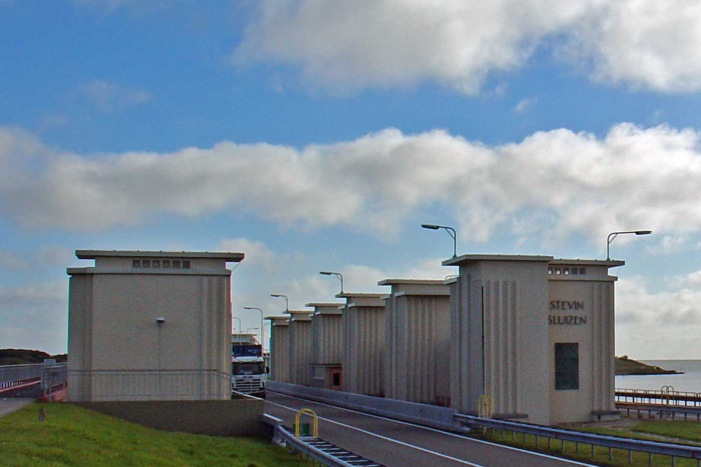 Stevinsluizen in de Afsluitdijk bij Den Oever (gem. Wieringen) in Noord-Holland